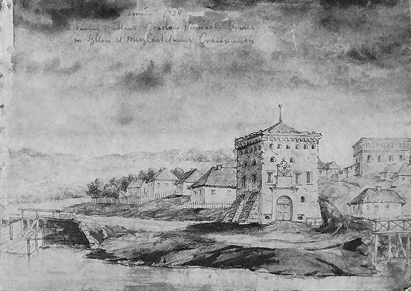 Satanów - Brama Miejska